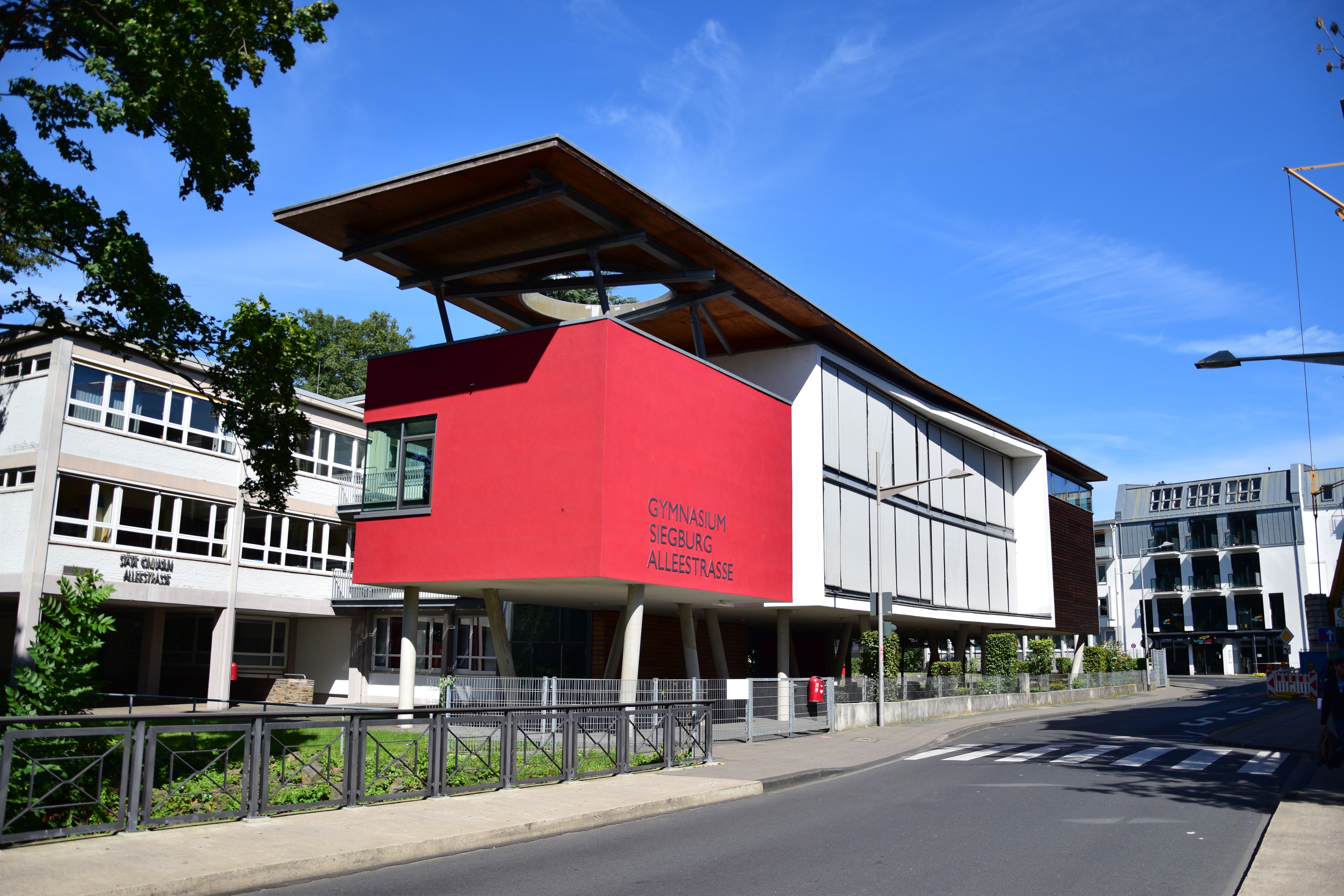 Seitenansicht